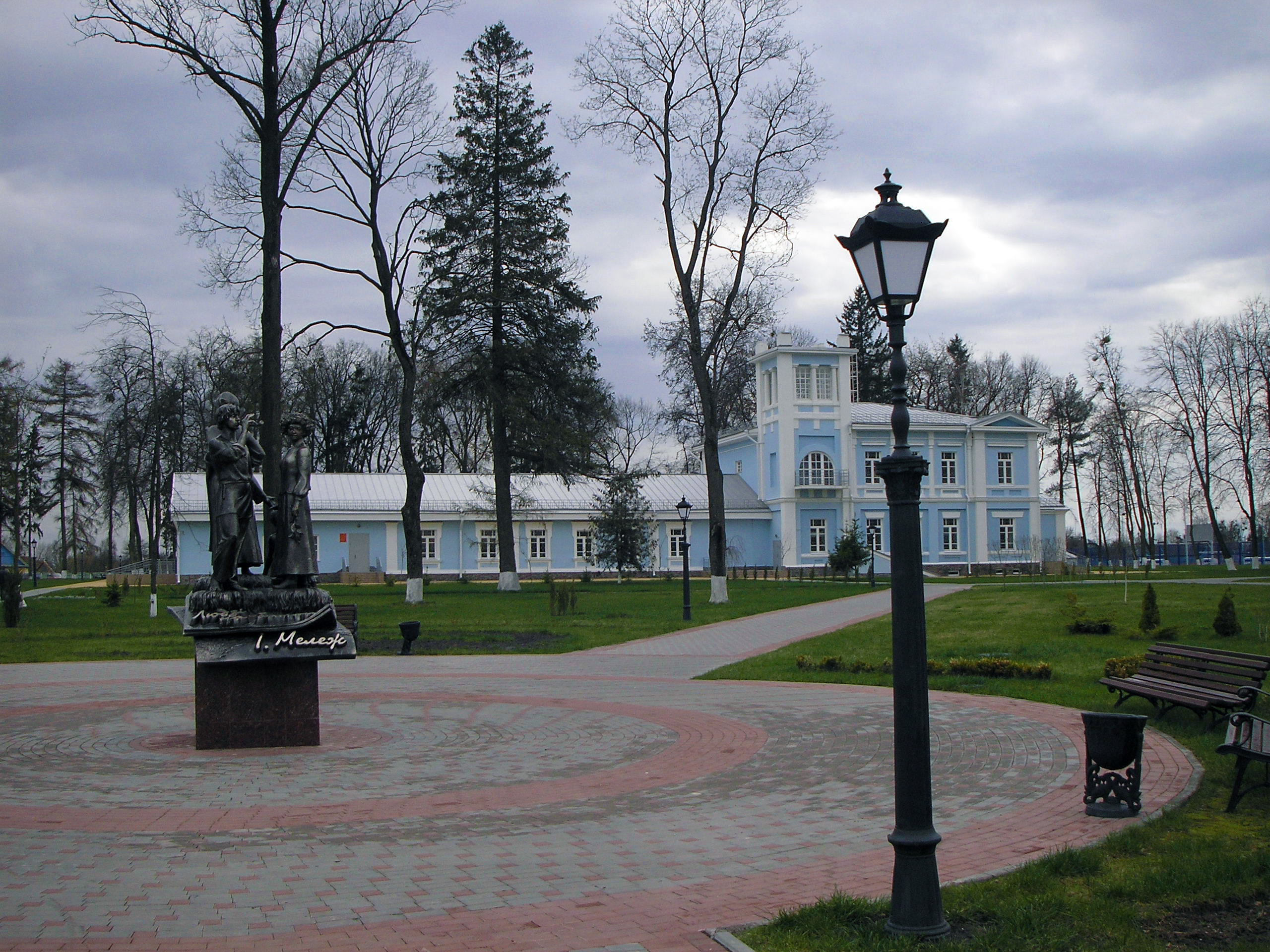 Беларуская (тарашкевіца): Фрагмэнты былой сядзібы: сядзібны дом, фрагмэнты парку. г. Хойнікі This is a photo of Belarusian heritage monument. Reference number: 313Г000786 ( WLM)